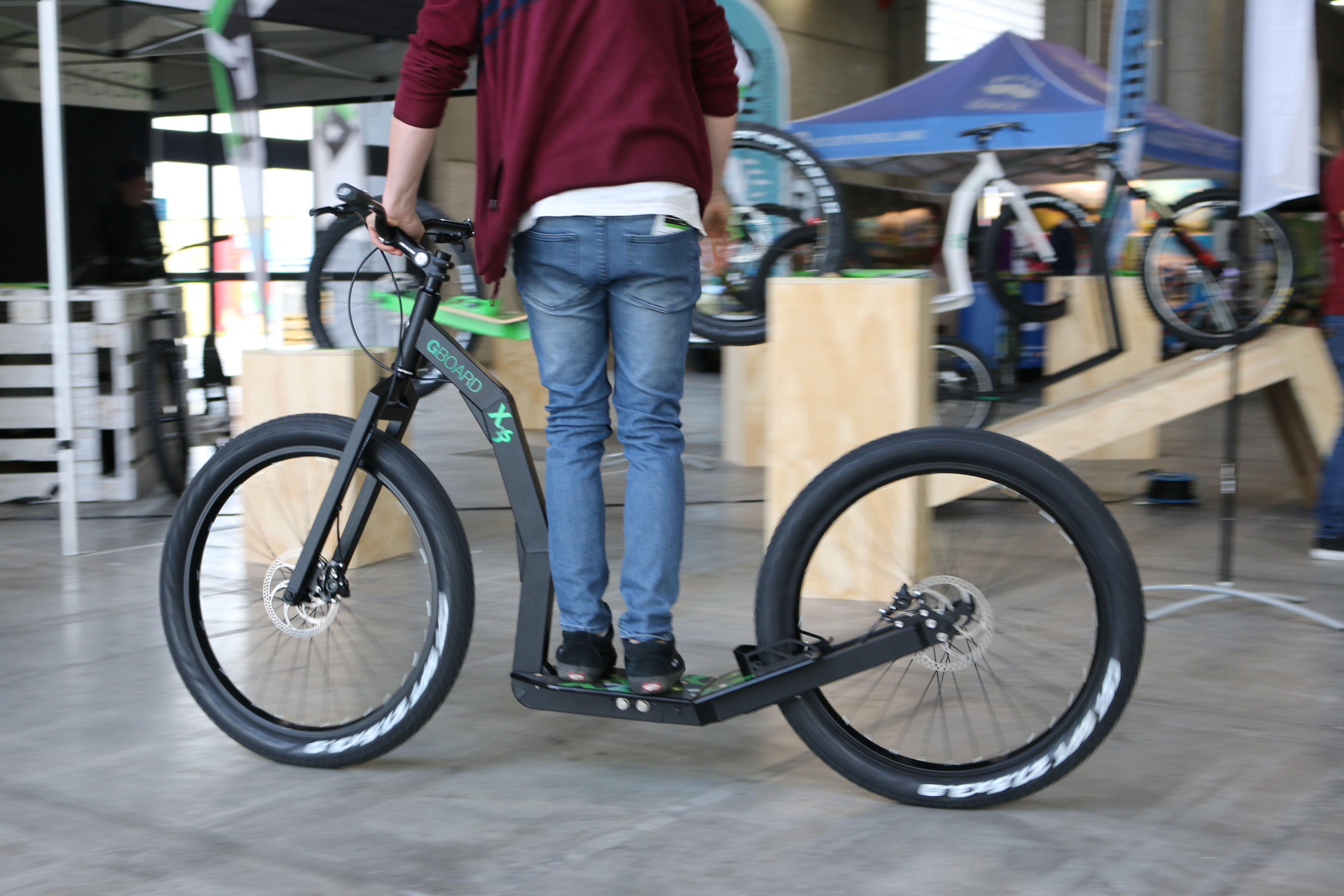 Il monopattino sportivo è un "nuovo" mezzo pensato per un uso outdoor polifunzionale.